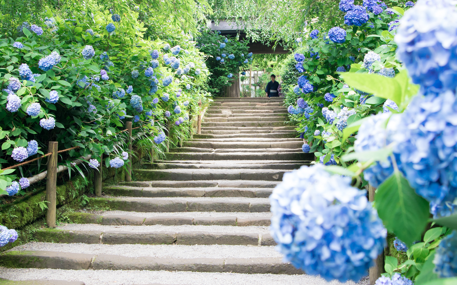 明月院（あじさい寺）、山門への階段。